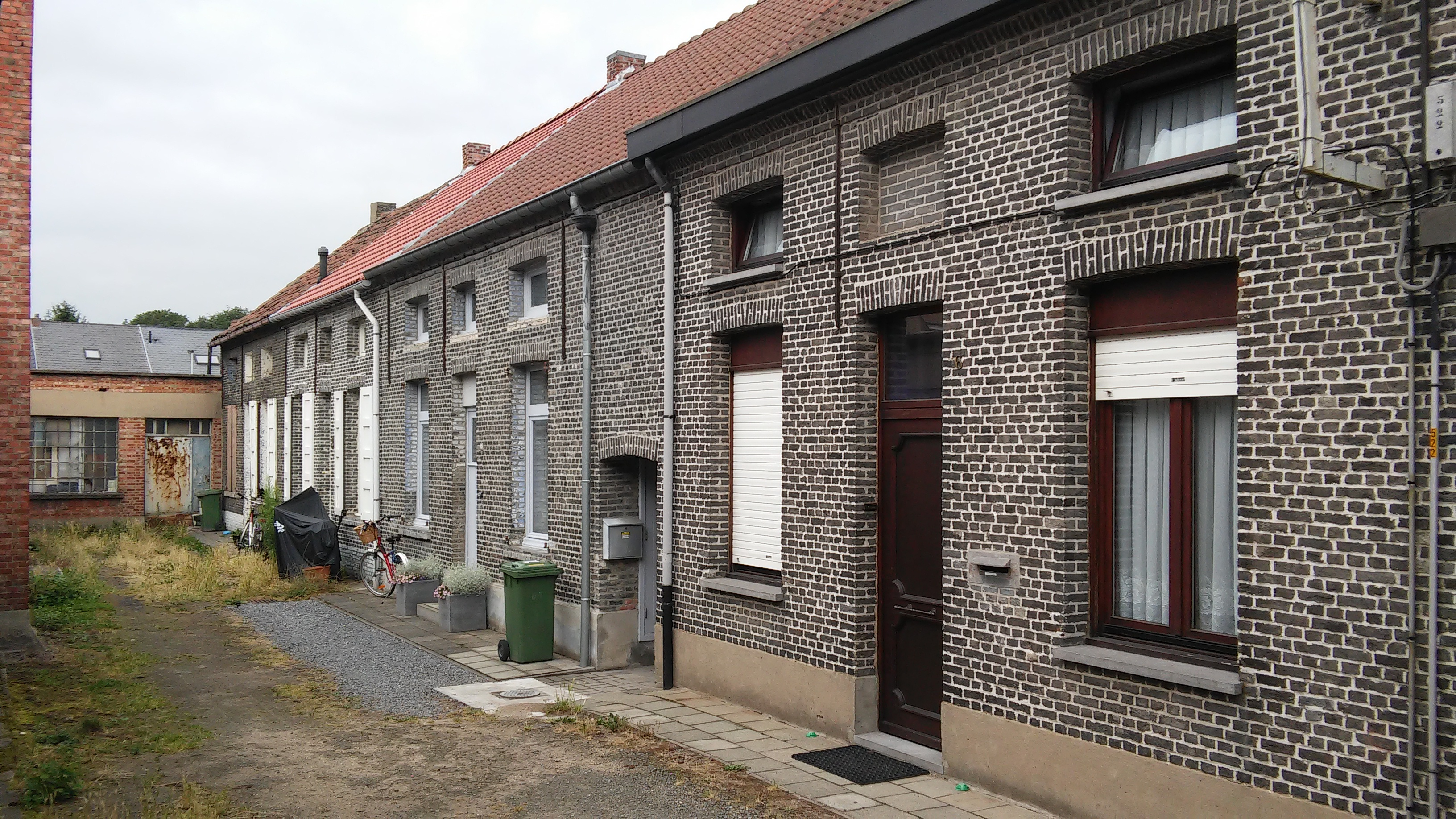 Arbeiderswoningen Nieuw Begijnhof 6-12, Niel